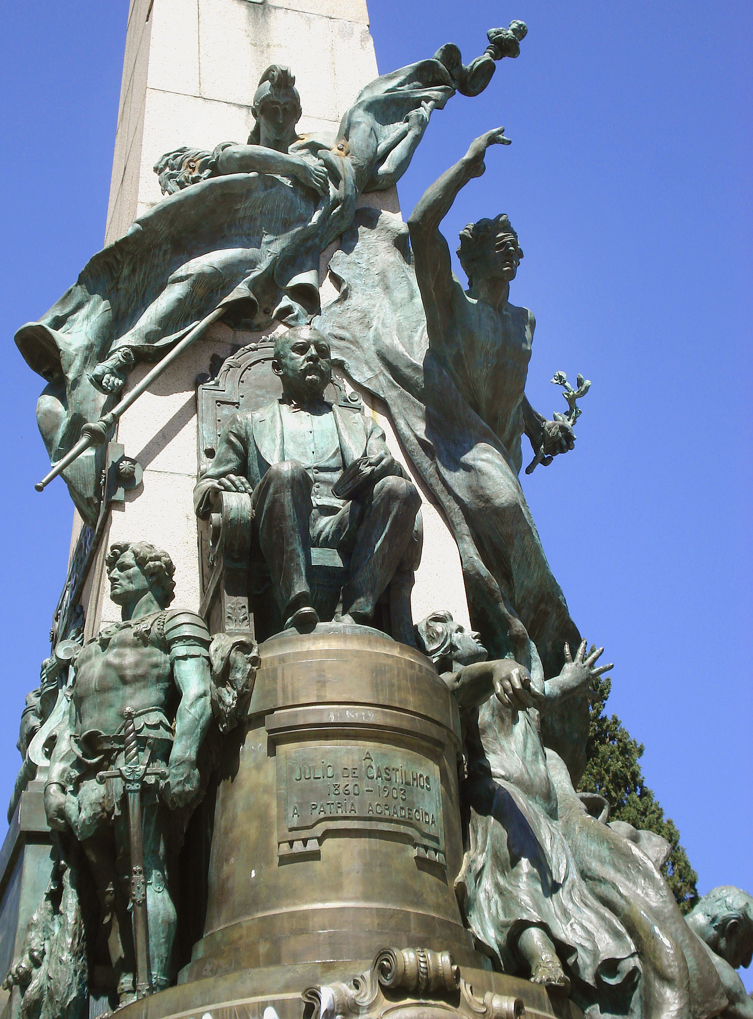 monumento a Júlio de Castilhos, Praça da Matriz, Porto Alegre, Brasil.